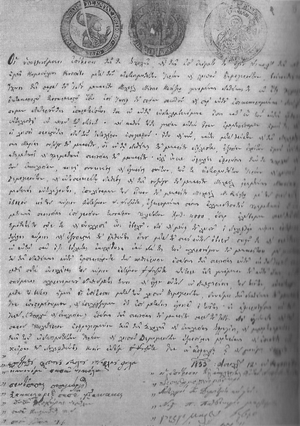 Завещание от 1853 година в полза на гръцкото училище в Крушево